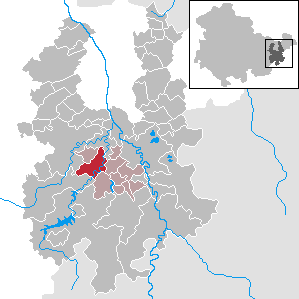 Steinsdorf in Thuringia - District Greiz